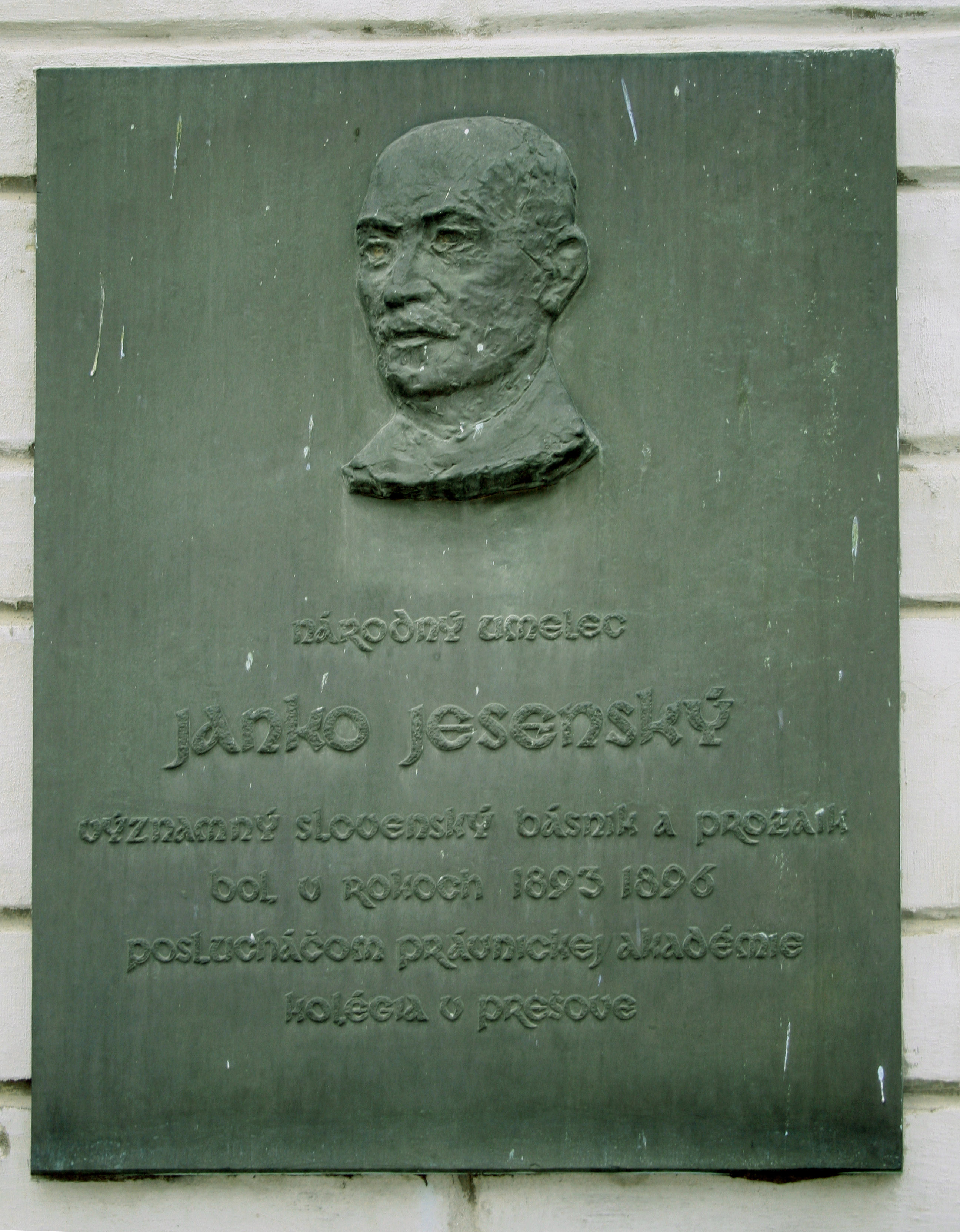 Tabuľa venovaná spisovateľovi Jánovi Jesenskému